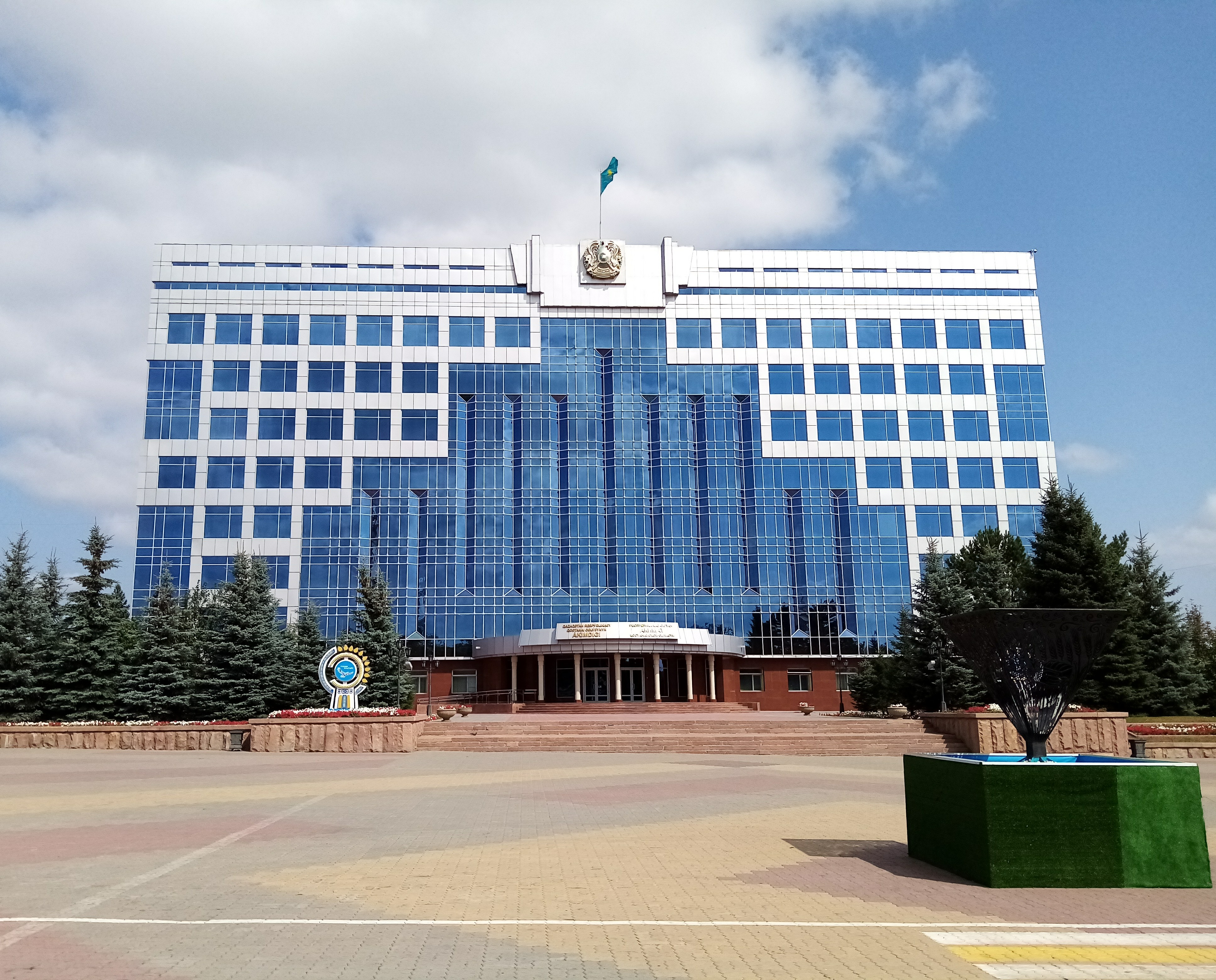 Здание акимата Костанайской области